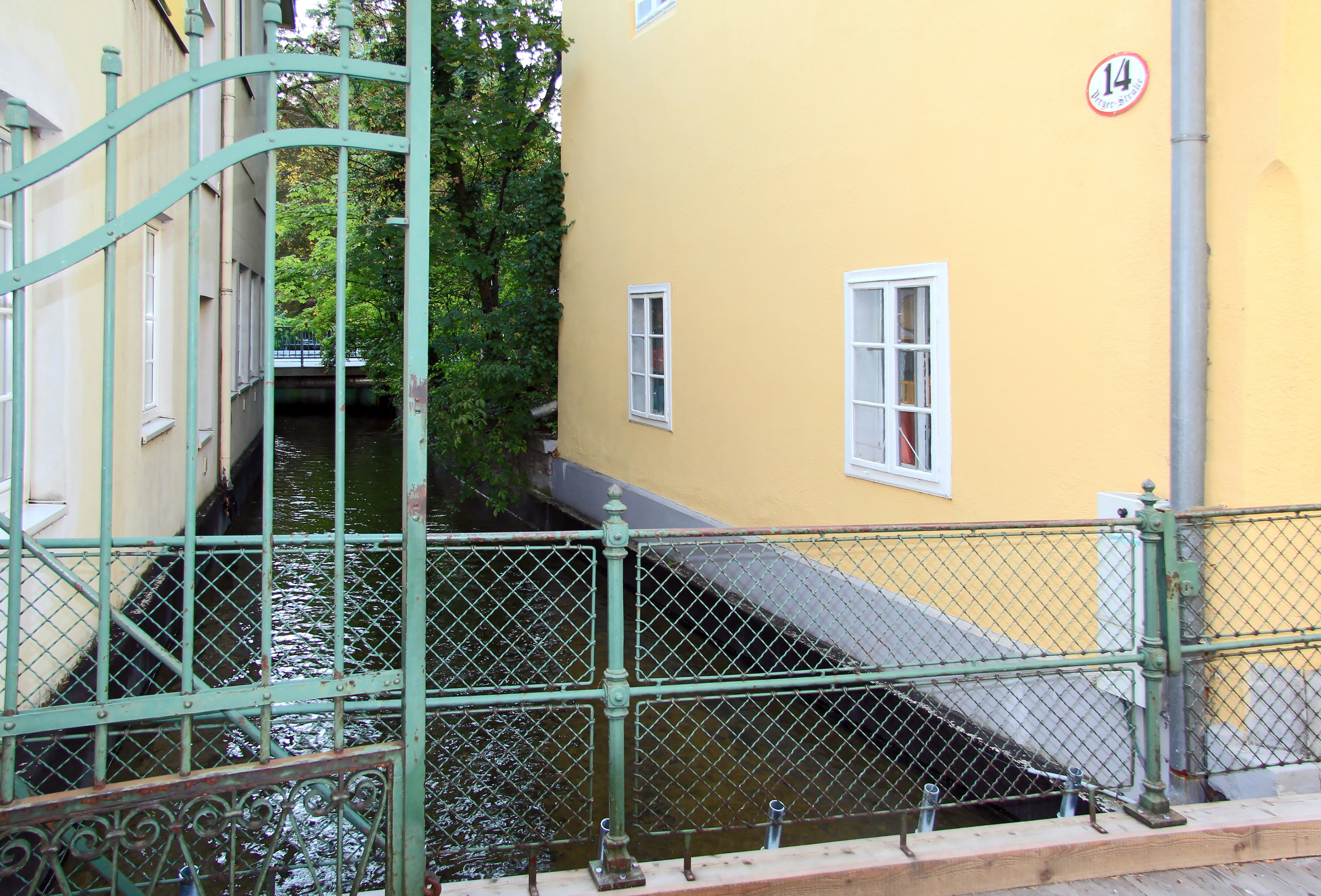 Badener Mühlbach im Bereich des ehem. Bürgerspitals